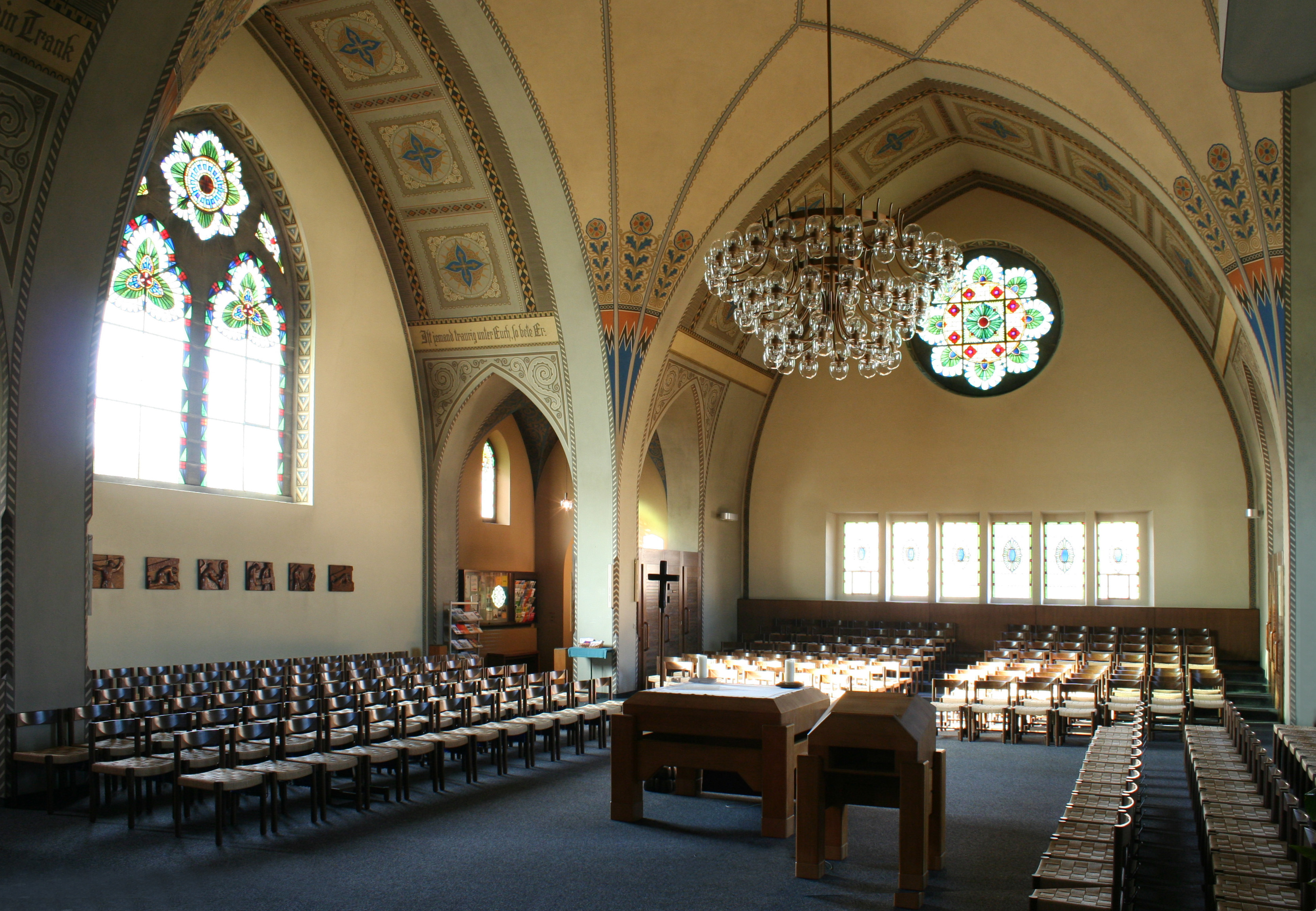 Römisch-katholische Pfarrkirche St. Josef Winterthur-Töss, Altar